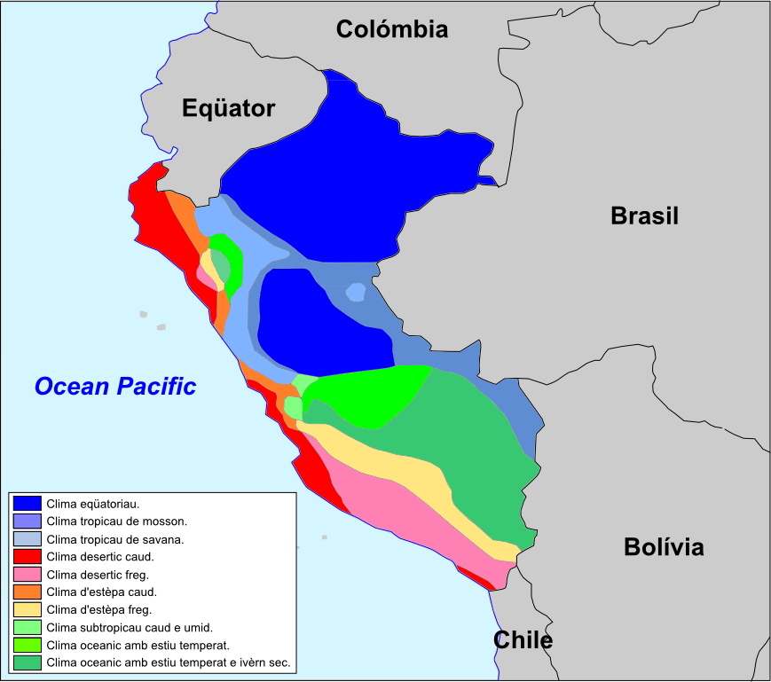 Clima de Peró.